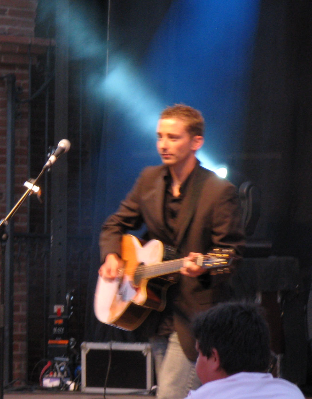 Concert pour la fête de la musique à Castelsarrasin